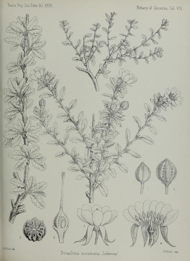 Tab. VIII - Dirachma socotrana, Schweinf.